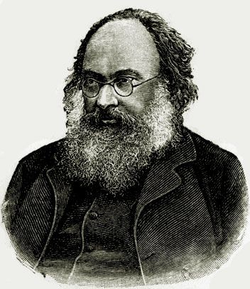 русский натуралист-зоолог Николай Алексеевич Северцов